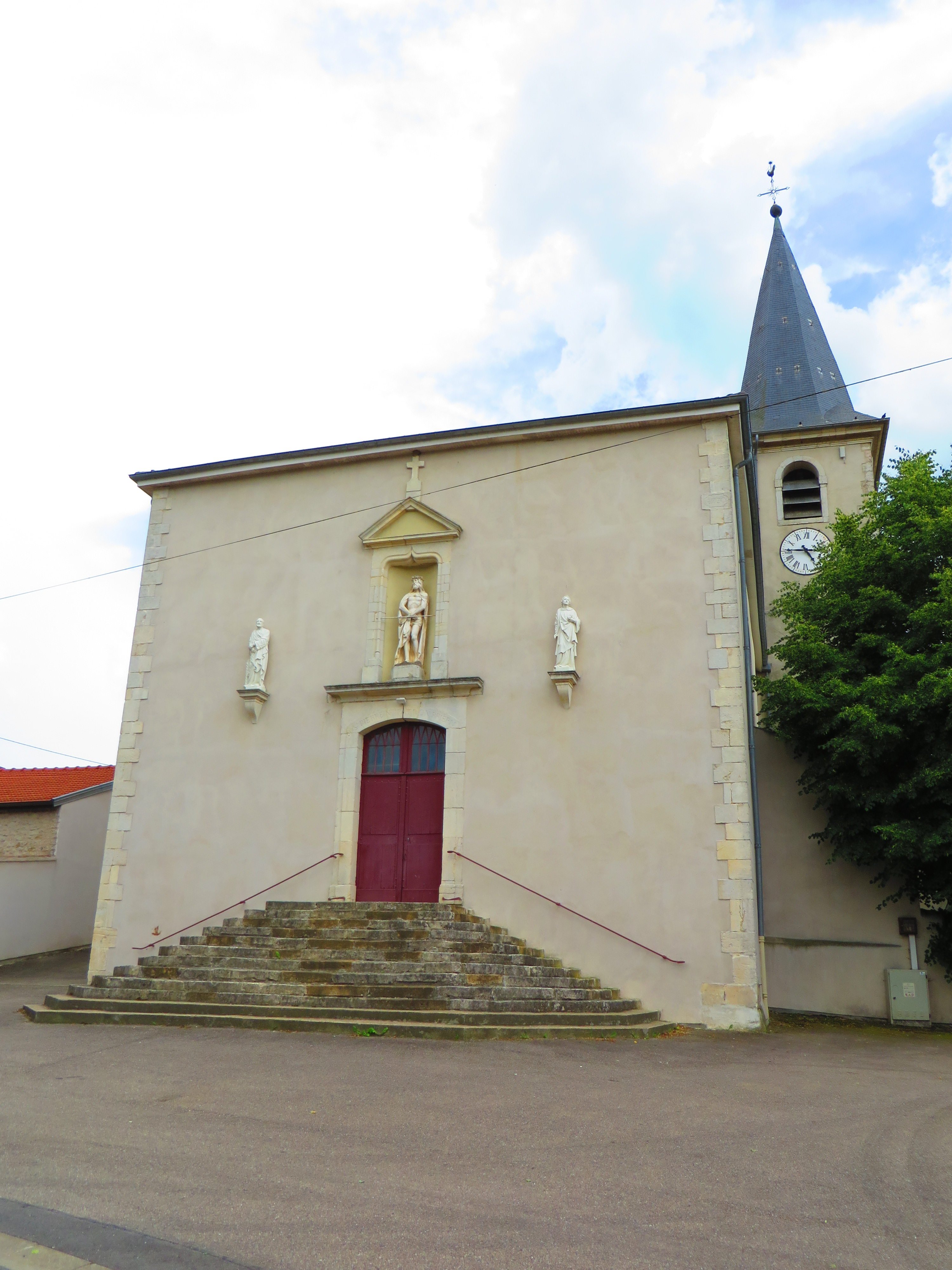 Faulx Église Saint-Pierre